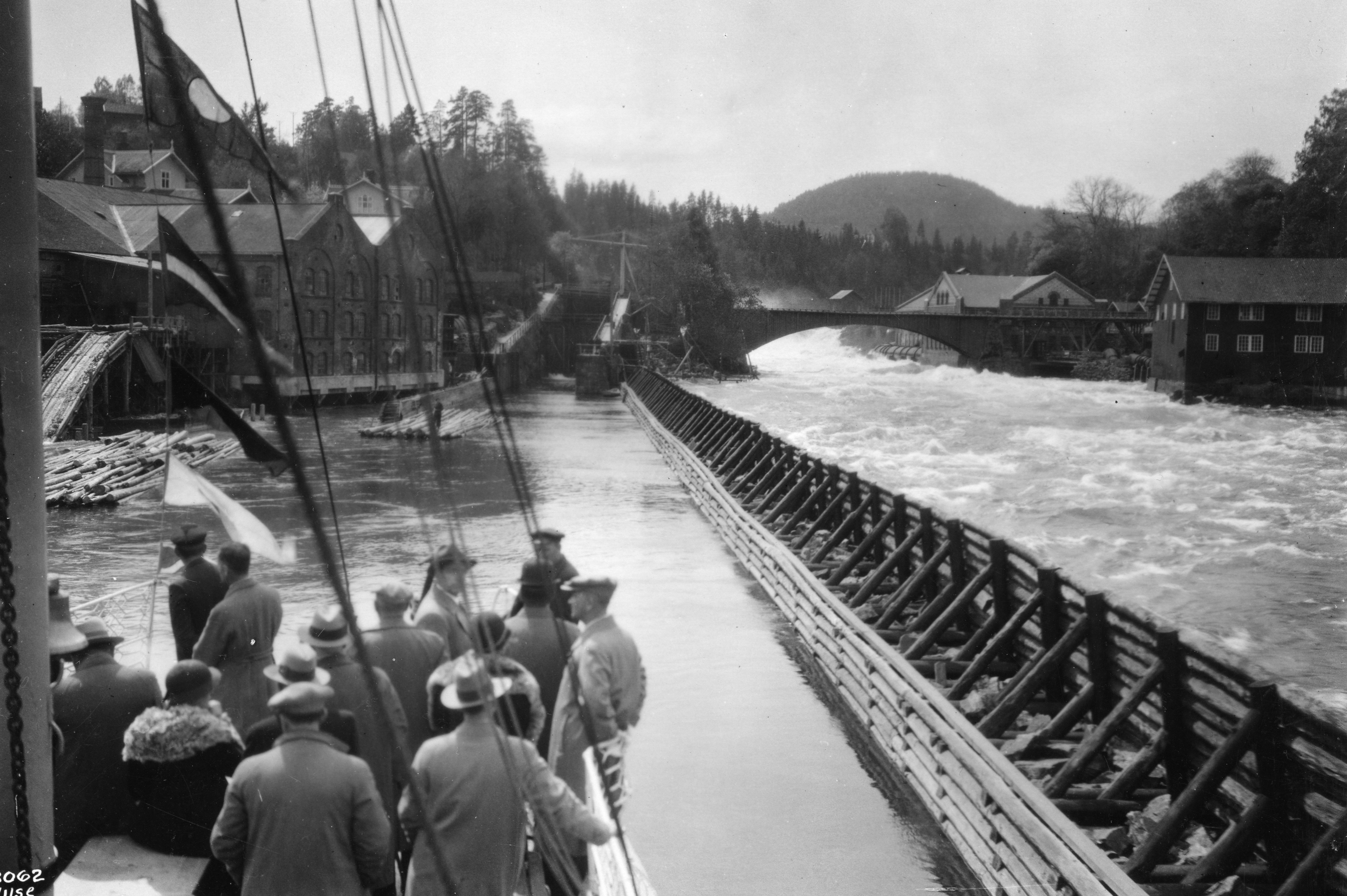 Bildet er hentet fra Arkivverket. På vei mot Ulefoss sluse, før 1933 Arkivinstitusjon : Statsarkivet i Kongsberg Arkivnavn : Skien -Telemarkens Dampskipsselskap Sted : Norge, Telemark, Nome, Ulefoss sluse Emneord: Telemarkskanalen, Båt, Sluser Avbildet